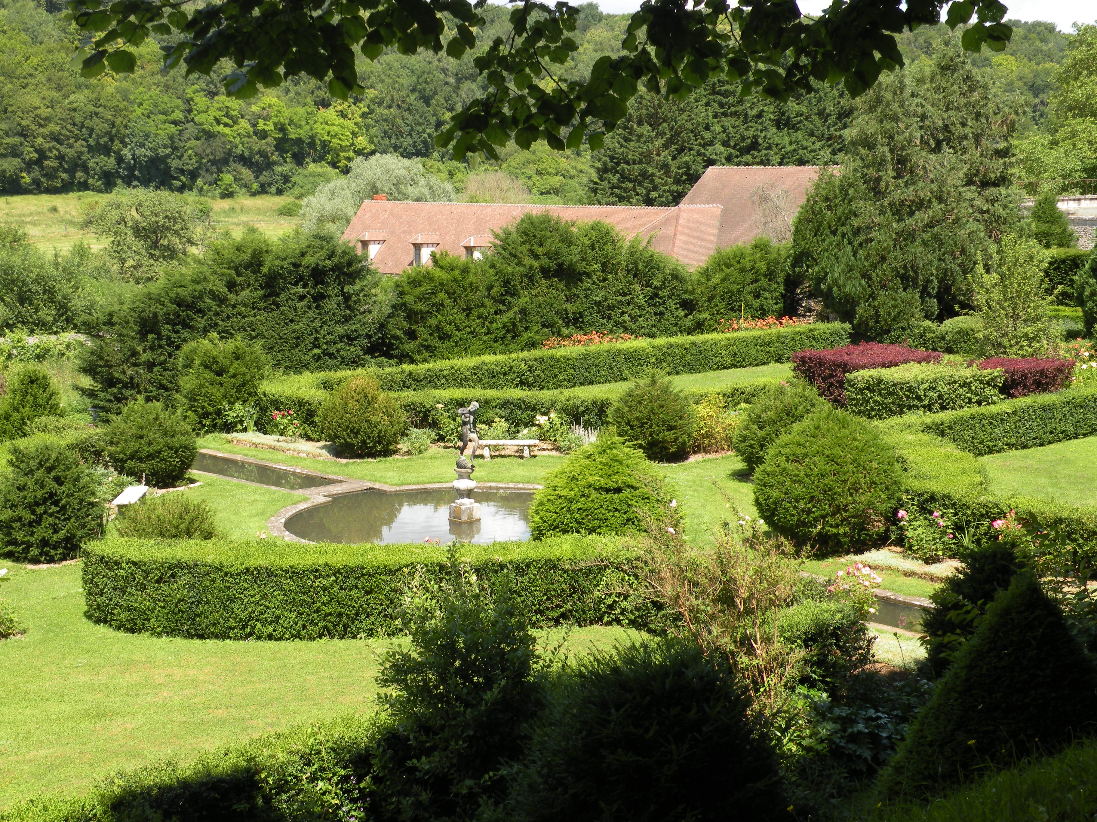 Château d'Ambleville